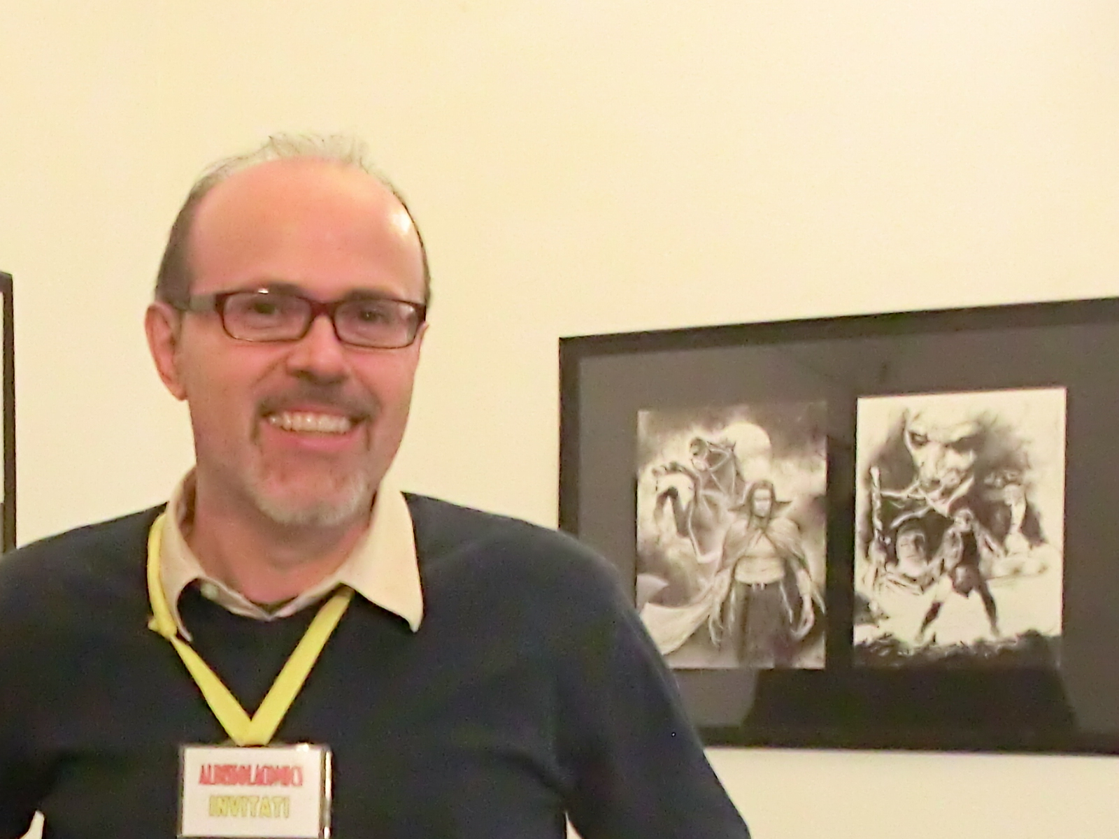 Nicola Genzianella ad Albissola Comics 2014